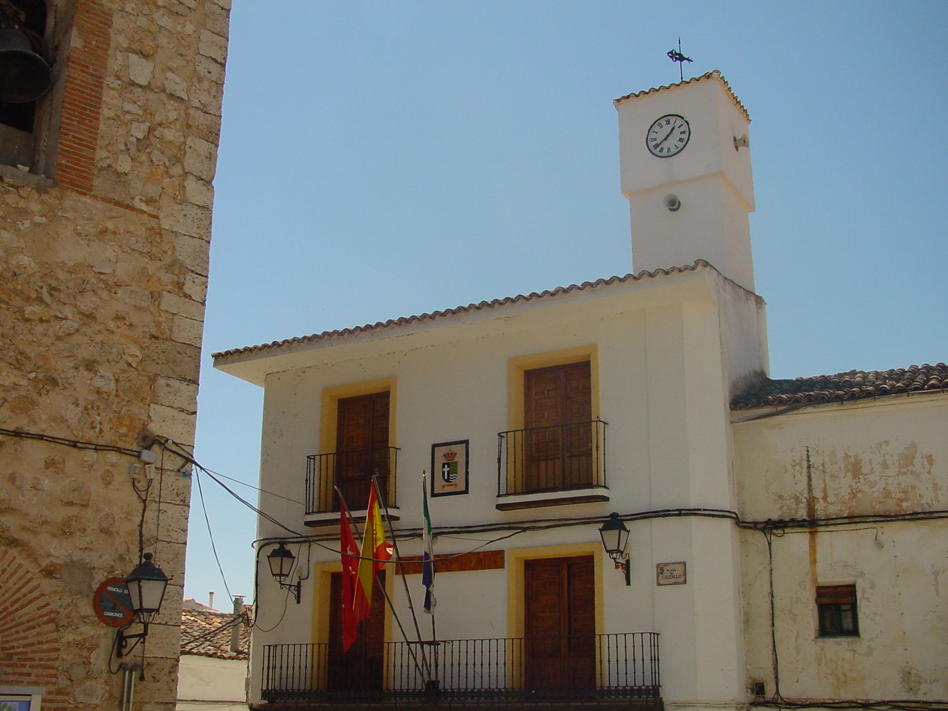 Ayuntamiento de Ambite.